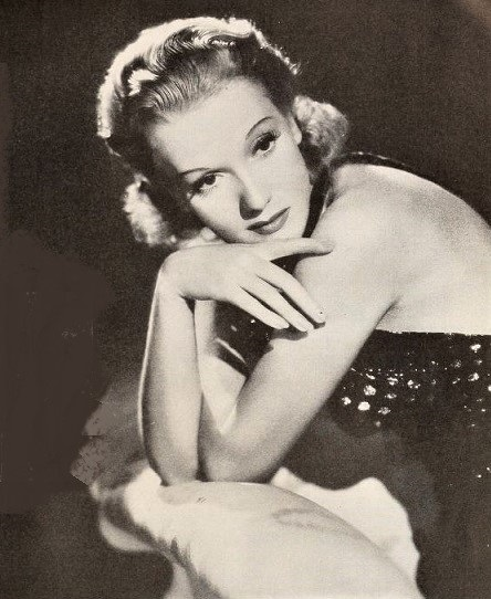 Isa Miranda